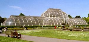 Gewächshaus in Kew Gardens